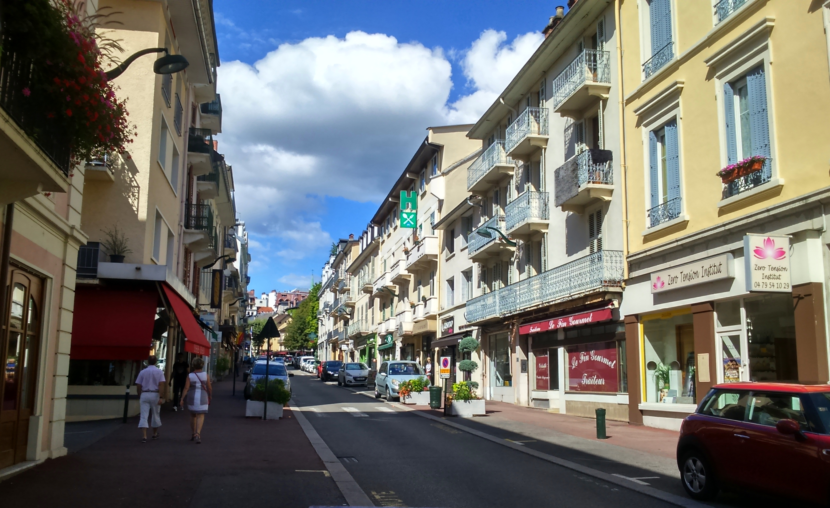 La rue de Chambéry, dans le centre d'Aix-les-Bains, direction nord, vers l'hôtel de ville.